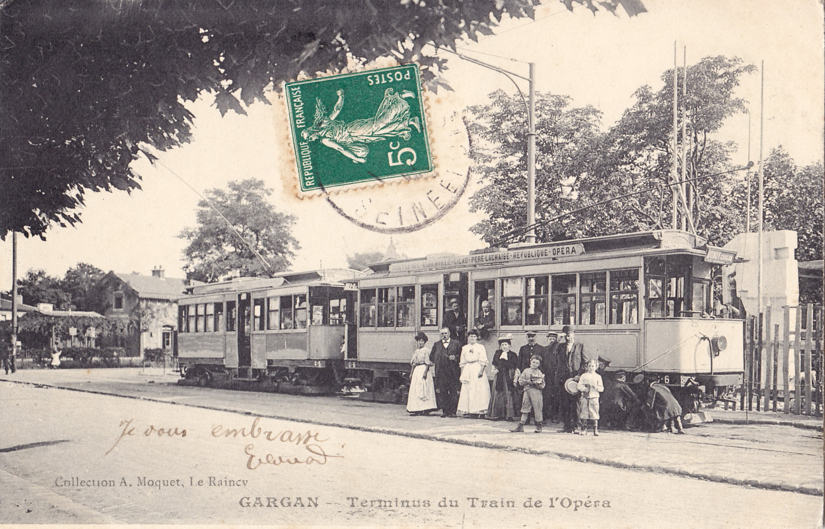 Carte postale ancienne éditée par A. Moquet au Raincy :GARGAN - Terminus du tram de l'Opéra.Terminus des Tramways Est-Parisiens à la gare de Gargan (Ligne N°1 de l'Est-Parisien)